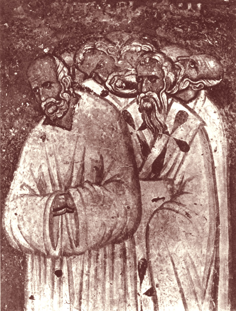 Nemanjin sabor protiv bogumila u Raškoj. Detalj sa freske iz crkve svetog Ahilija u Arilju, oko 1290. godine.